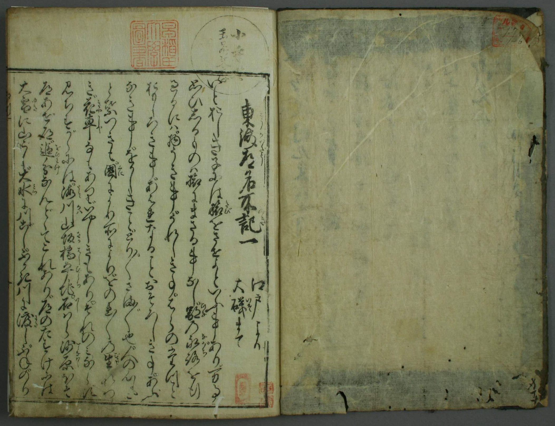 Tokaido meisho ki (東海道名所記) - volume 1 page